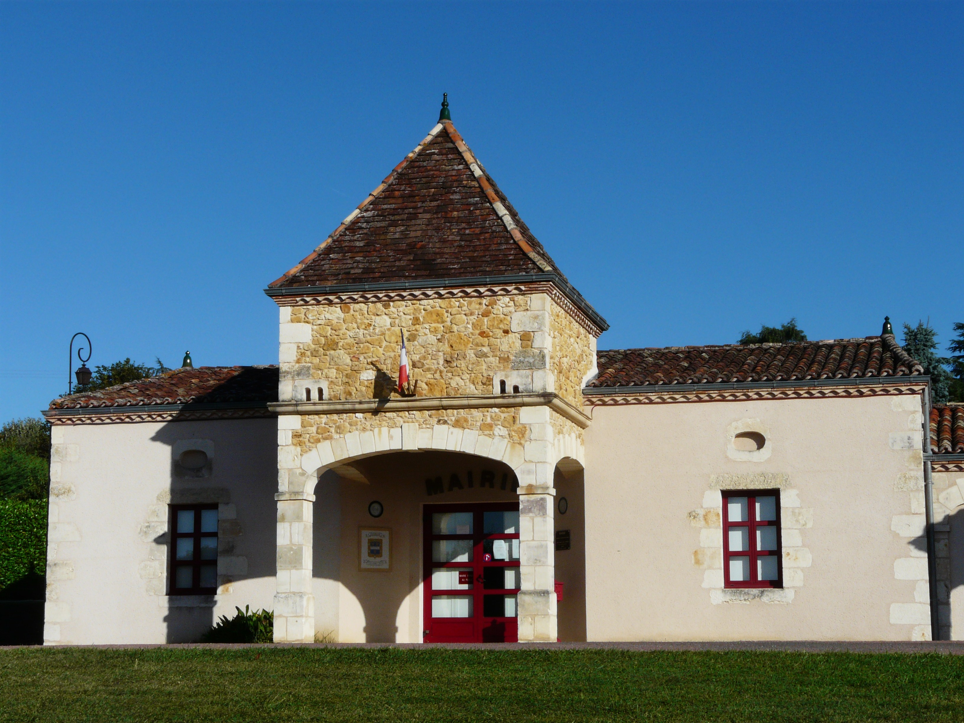 La mairie de Douzillac, Dordogne, France